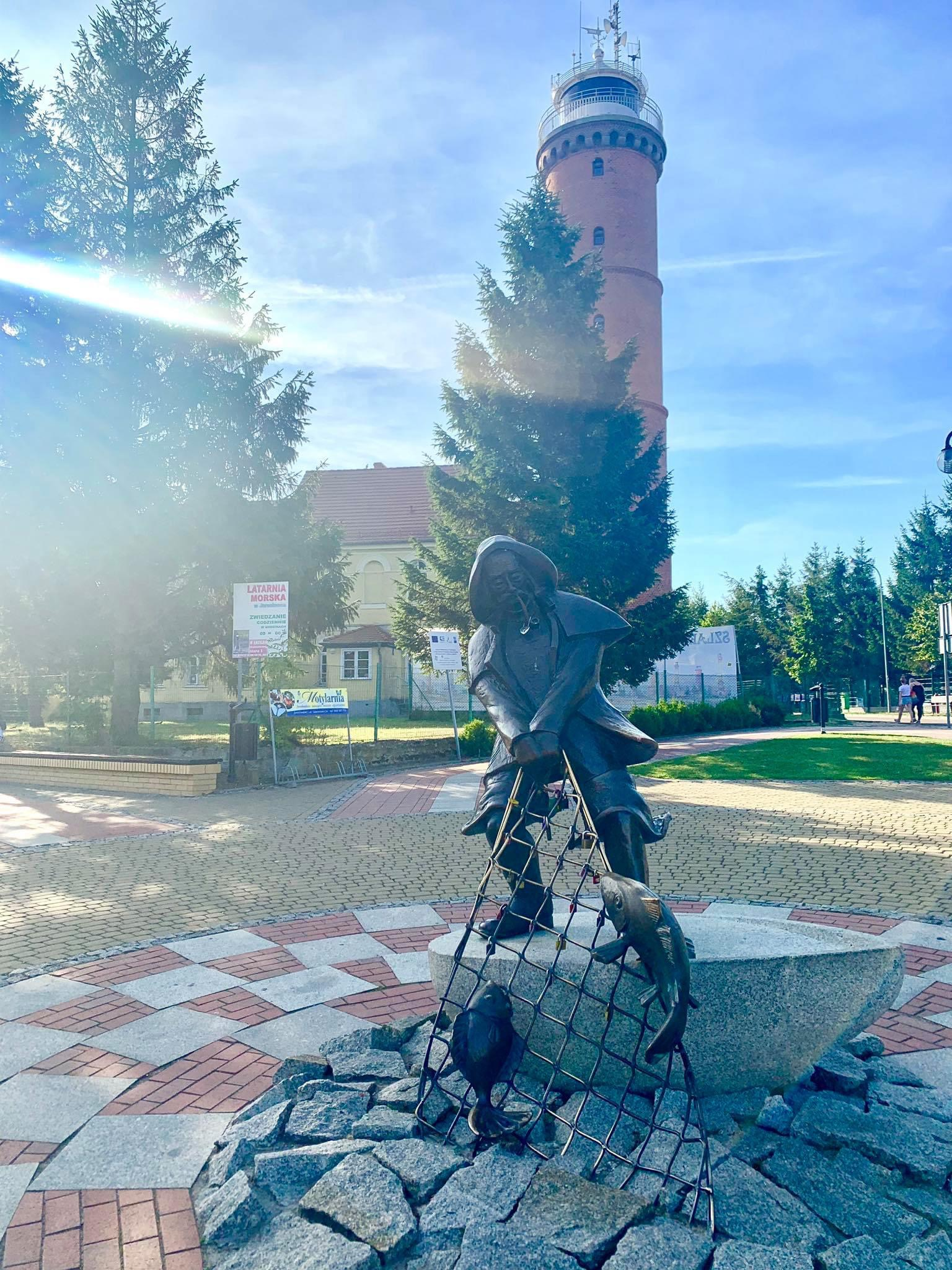 Posąg Rybaka w Jarosławcu